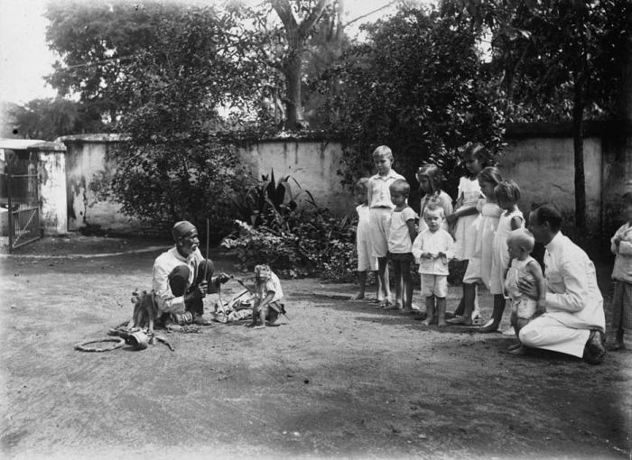 Foto. Arabische man met twee gedresseerde aapjes aan de ketting